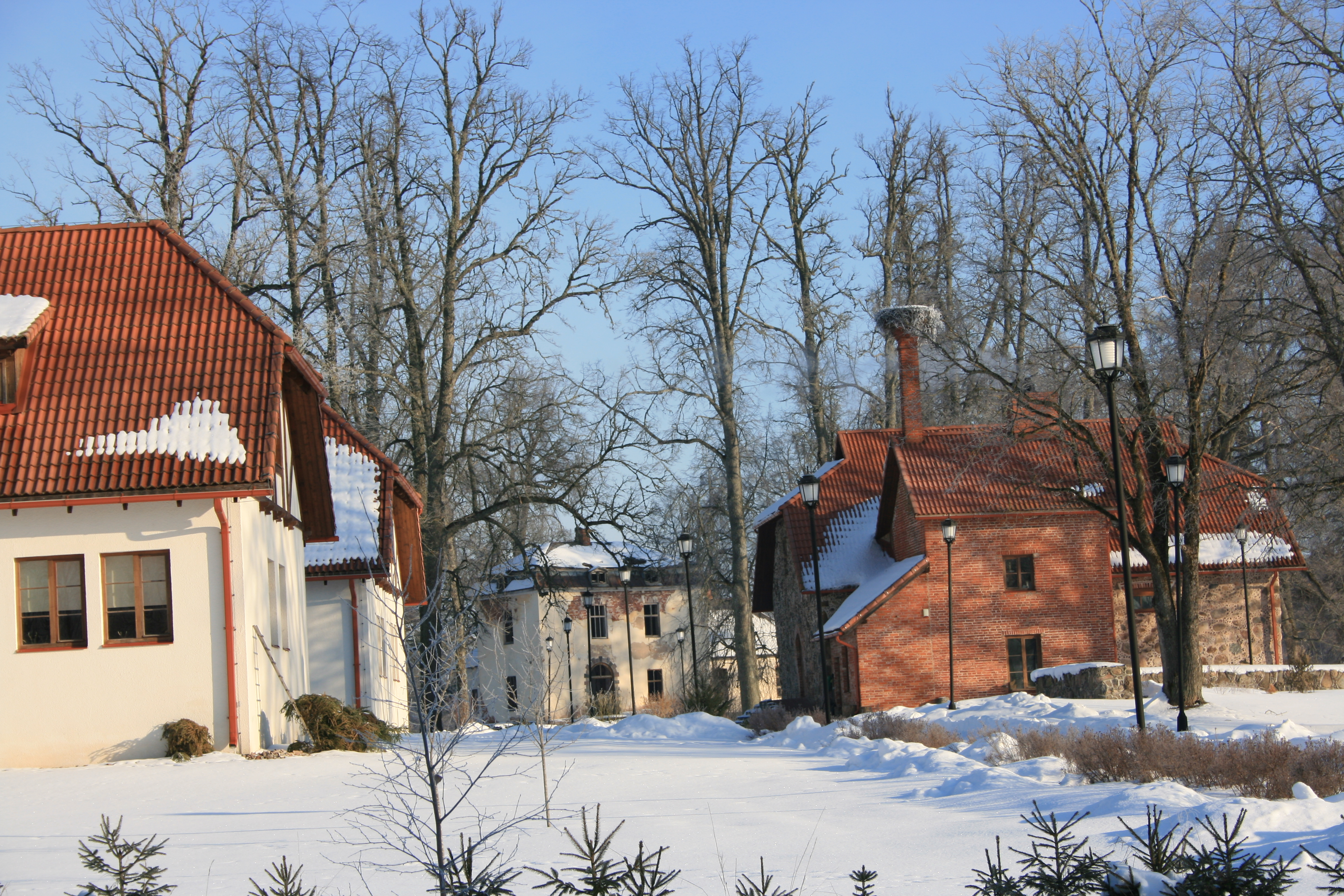 Augulienas muiža